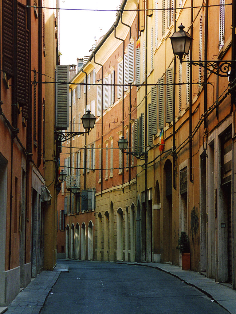 Modena, Emilia Romagna, Italia